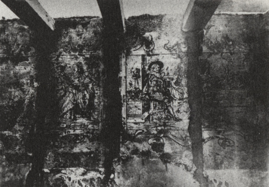 Innengestaltung des Hauses Kornmarkt 1 in Quedlinburg, aufgenommen während des Abrisses